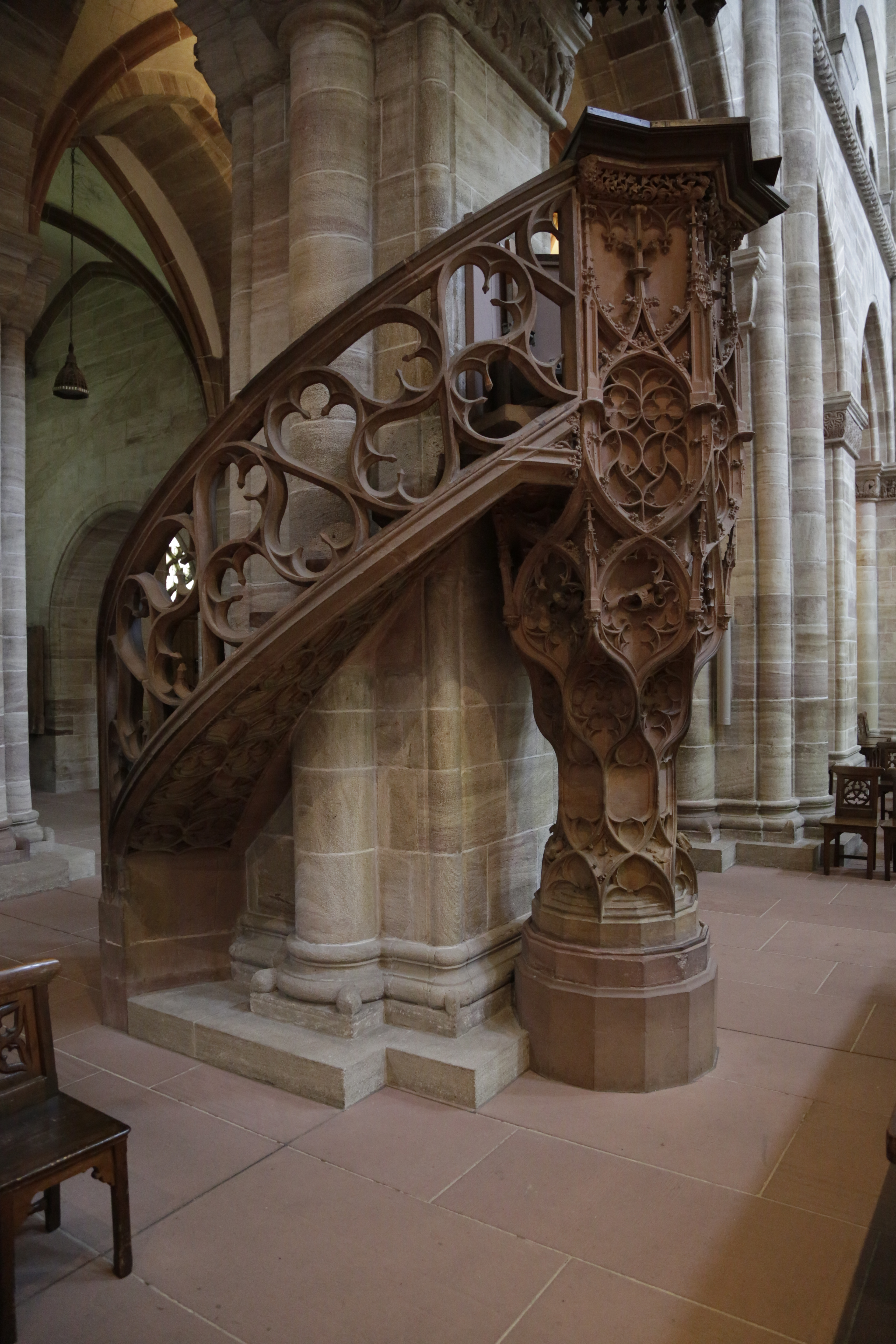 Die Kanzel im Münster von Basel.